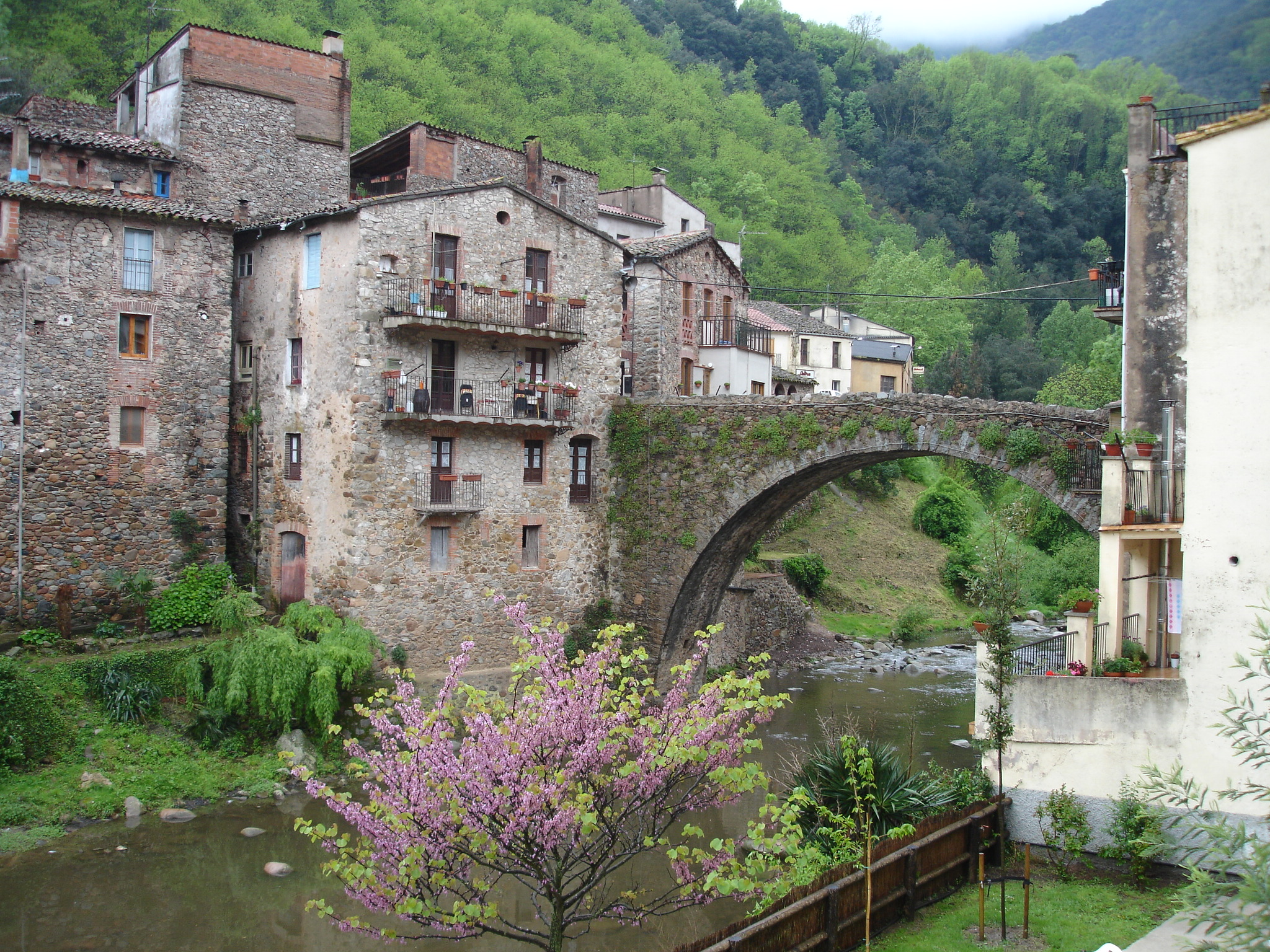 Osor (la Selva), Catalonia, Spain